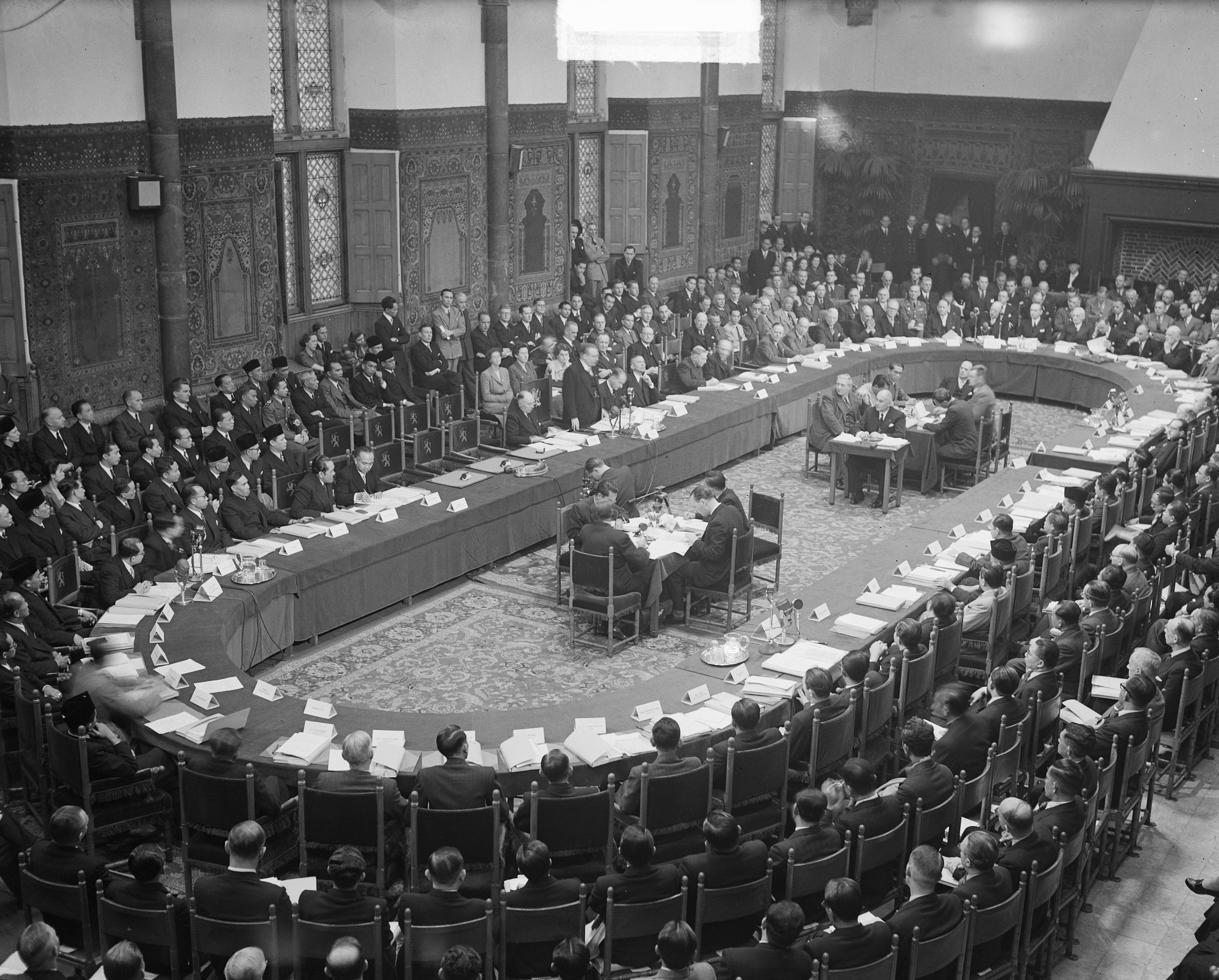 Collectie / Archief : Fotocollectie Anefo Reportage / Serie : [ onbekend ] Beschrijving : Ronde Tafel Conferentie , slotzitting in Ridderzaal, duplikaat overzicht Datum : 2 november 1949 Trefwoorden : overzichten, slotzittingen Instellingsnaam : Ridderzaal Fotograaf : Noske, J.D. / Anefo Auteursrechthebbende : Nationaal Archief Materiaalsoort : Glasnegatief Nummer archiefinventaris : bekijk toegang 2.24.01.09 Bestanddeelnummer : 903-6872